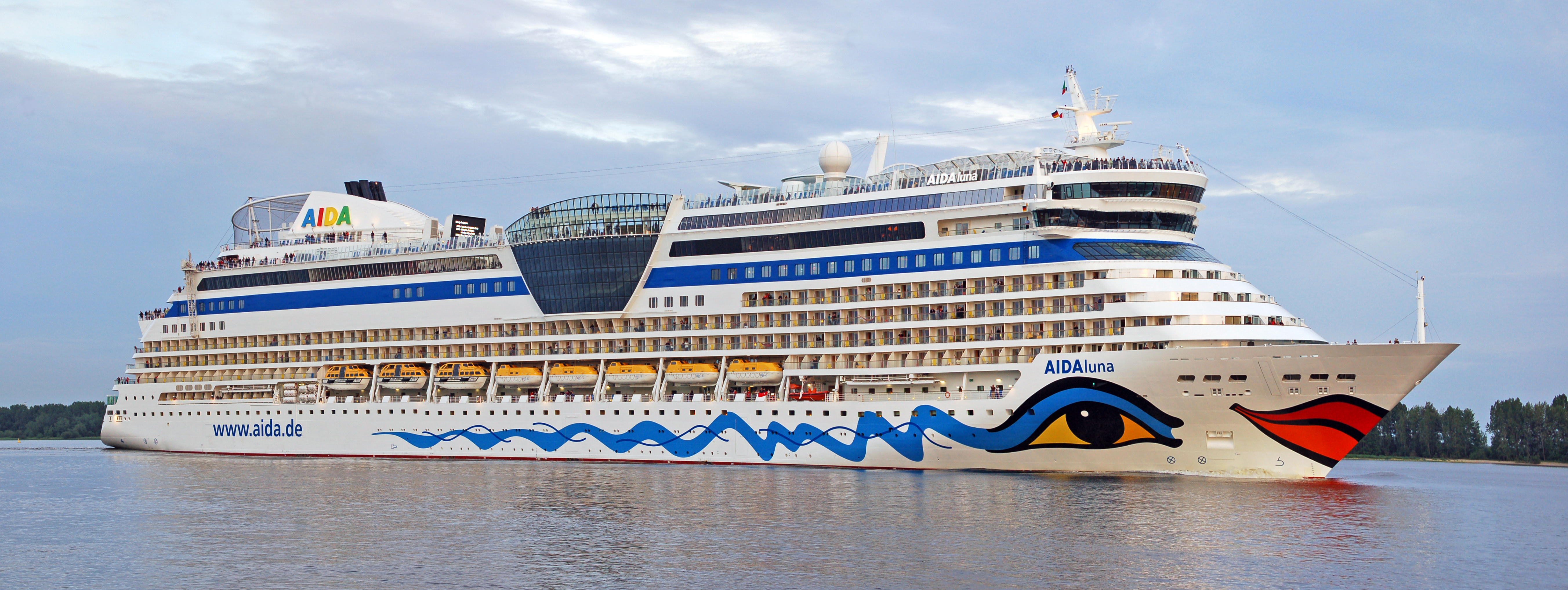 Die AIDAluna, aufgenommen in der Abenddämmerung auf der Elbe bei Wedel IMO-Nummer: 9334868 MMSI-Nummer: 247255400 Rufzeichen: ICLP Länge: 252.0m Breite: 38,0m Flagge: Italy